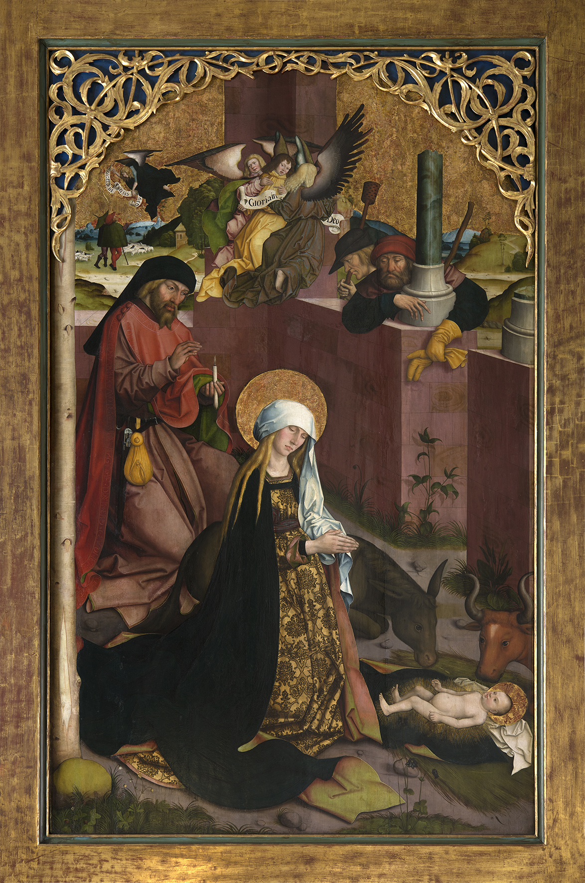 Geburt Christi, Gemälde von Bartolomäus Zeitblomm